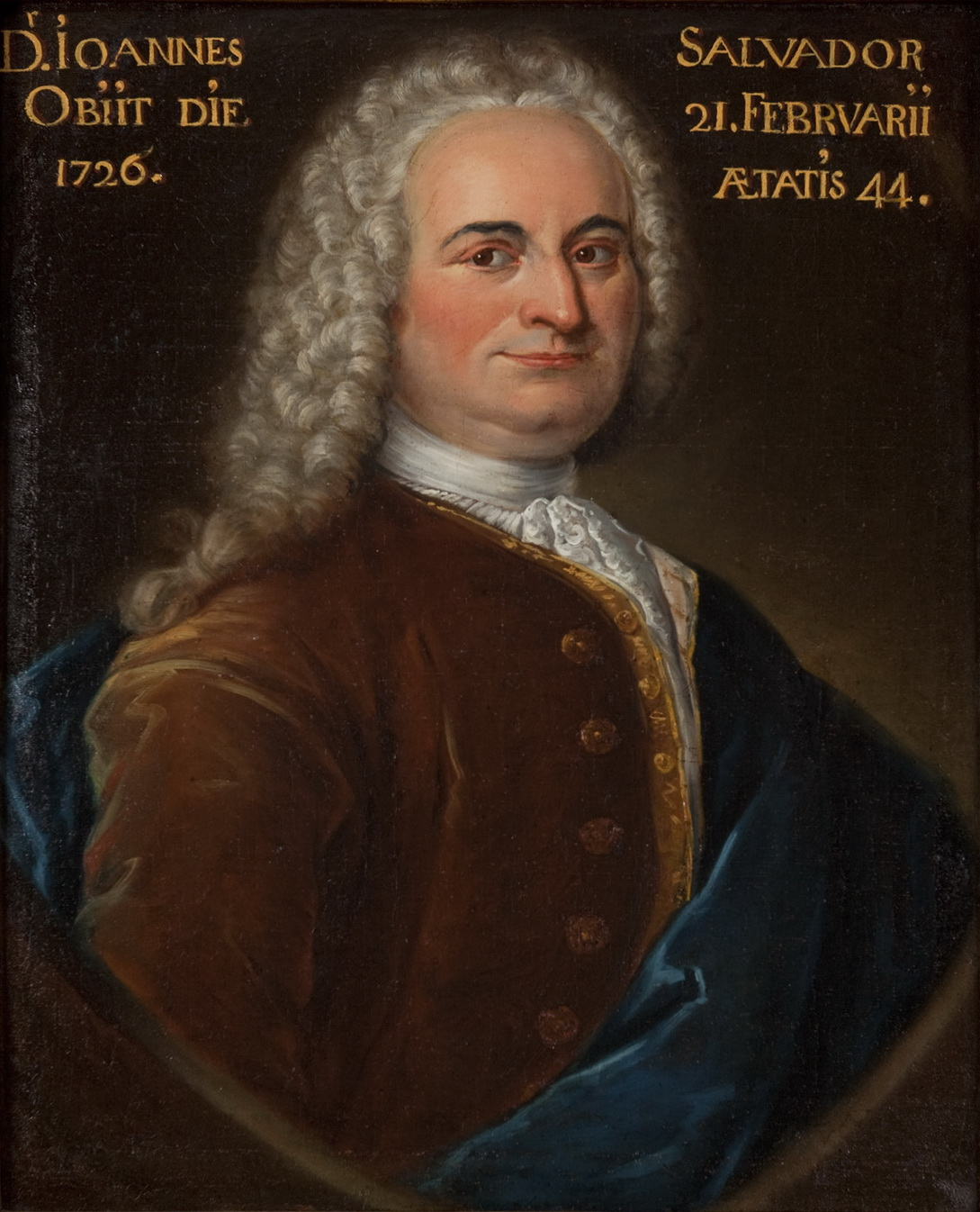 Retrat de Joan Salvador i Riera (1683-1726)